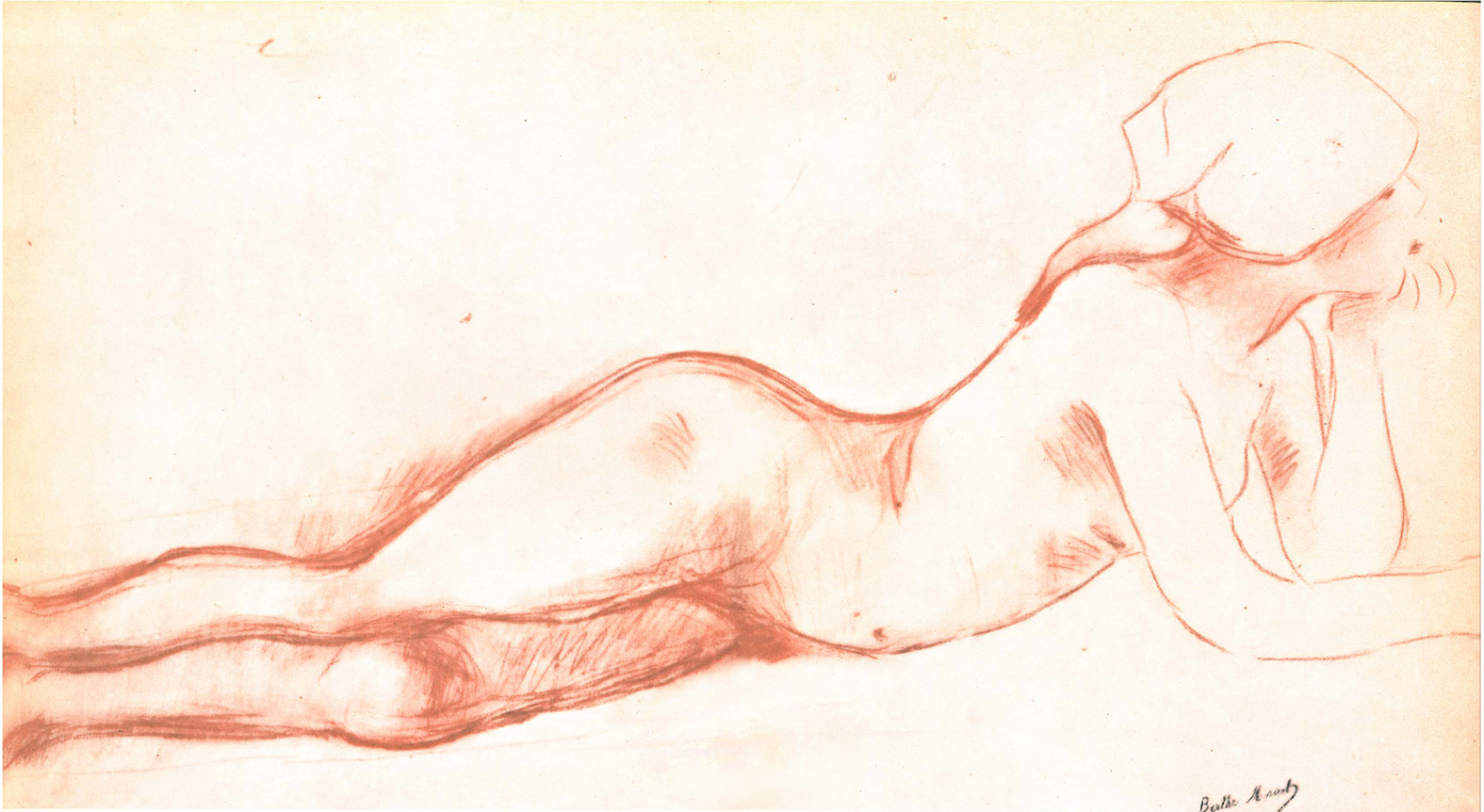 Aktstudie eines liegenden Bauernmädchens, Technik: Rötelzeichnung, Format: 15 x 23 cm